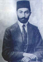 Seyyed Mohammadali Jamalzadeh (1982-1997)